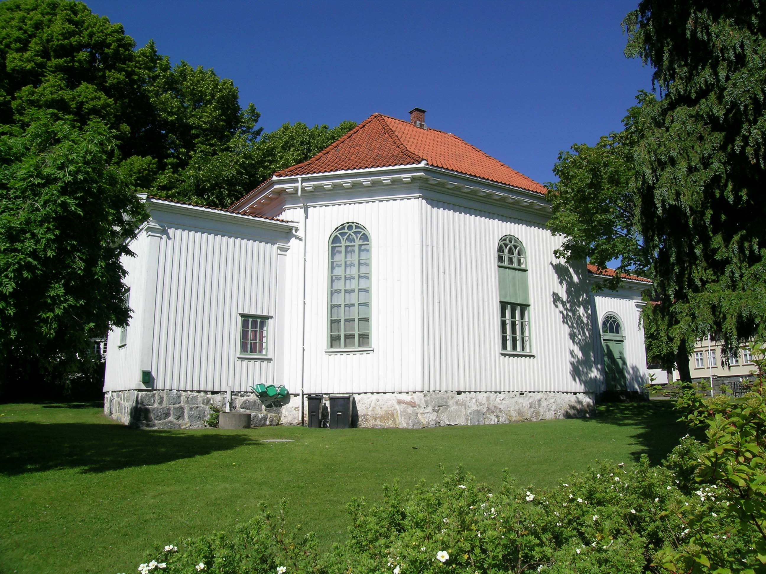 Langestrand kirke, Larvik, Norway